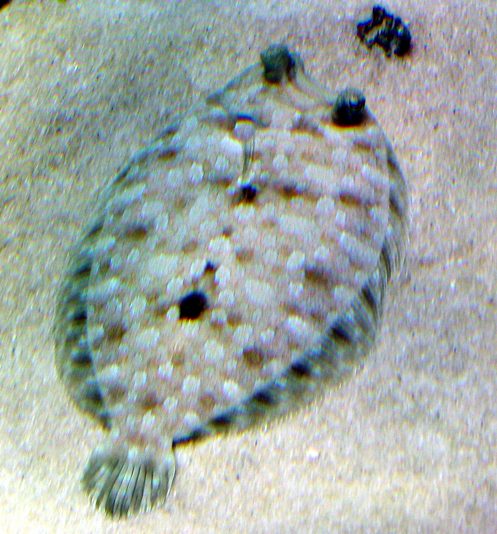 Bothus podas in Aquarium Cinéaqua Map: 48° 51' 44" N 2° 17' 27" E